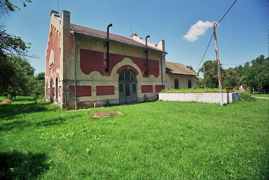 Srpski (latinica): Crpna stanica Dubovac, Kovin